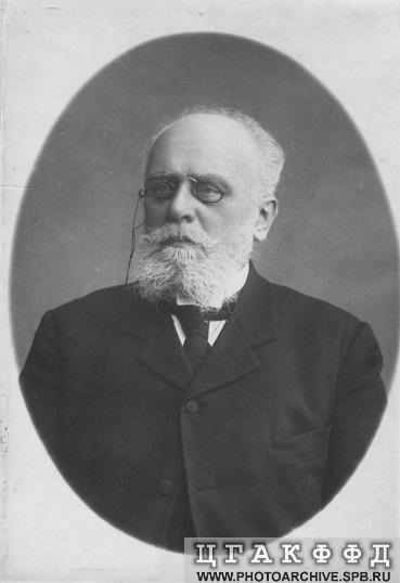 Сенатор, обер - прокурор святейшего Синода, член совета министров В.К.Саблер (портрет).